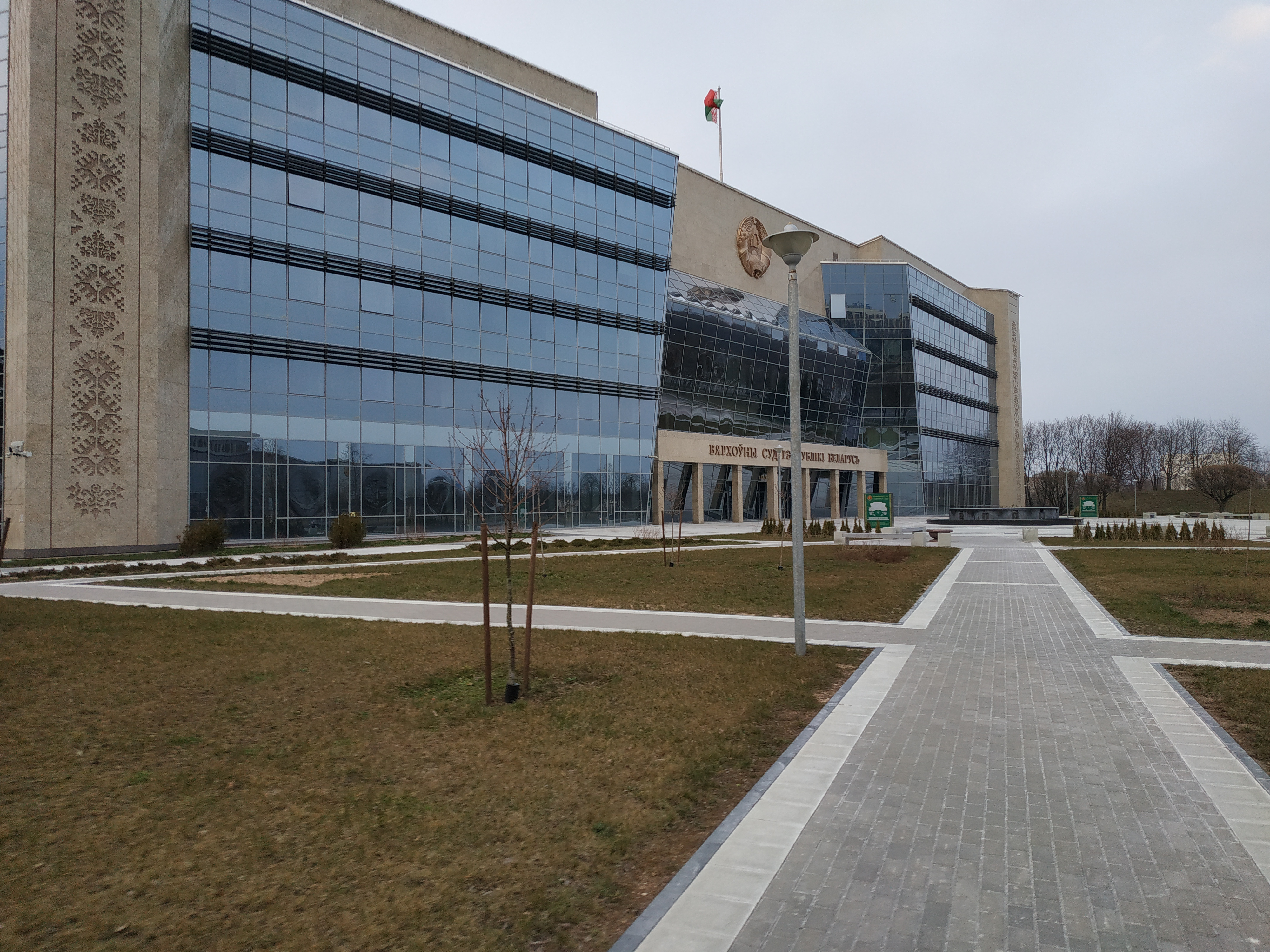 Supreme court of the Republic of Belarus Верховный суд Республики Беларусь